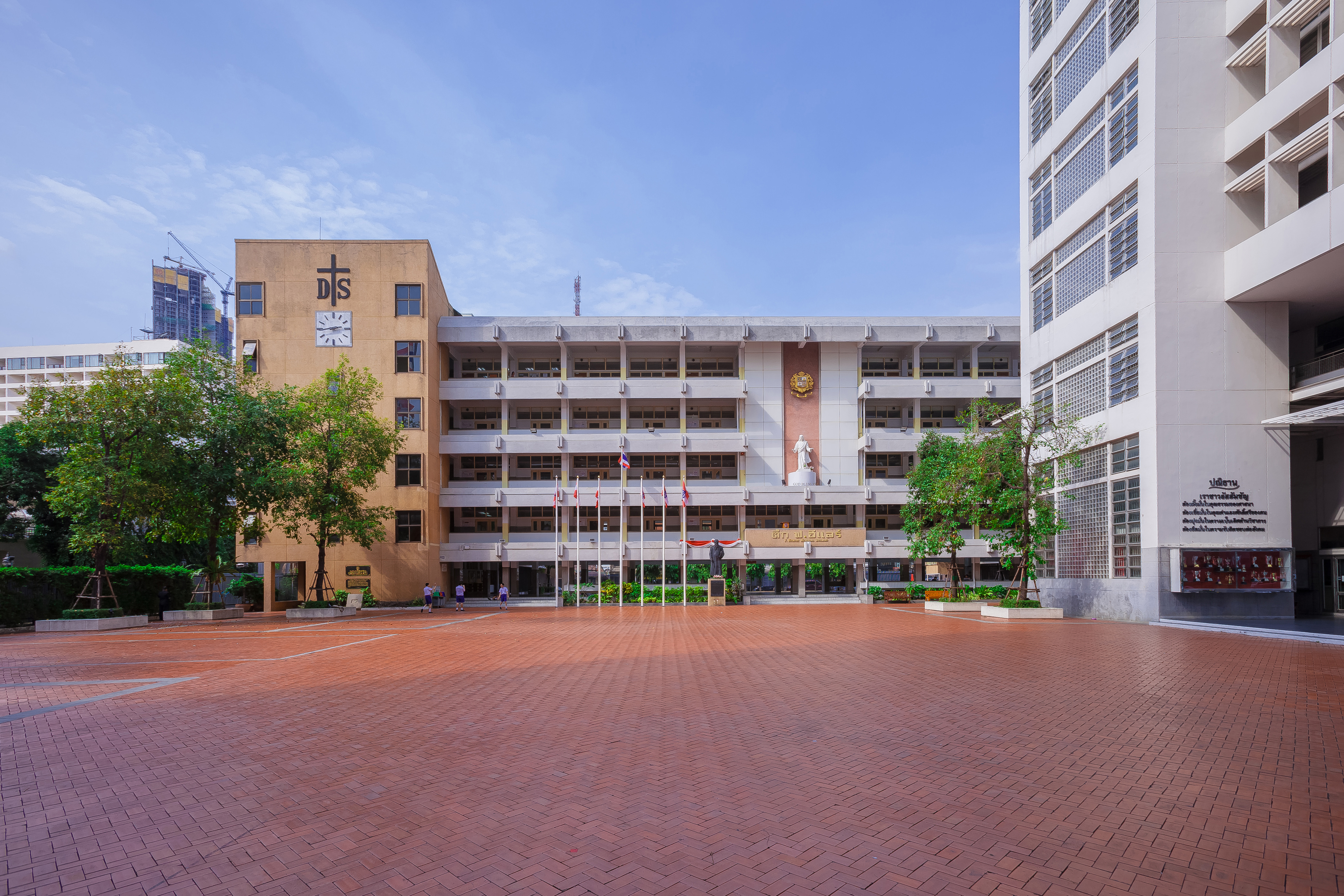 F. Hilaire ฺ Building at Assumption College, Bang Rak, Bangkok.